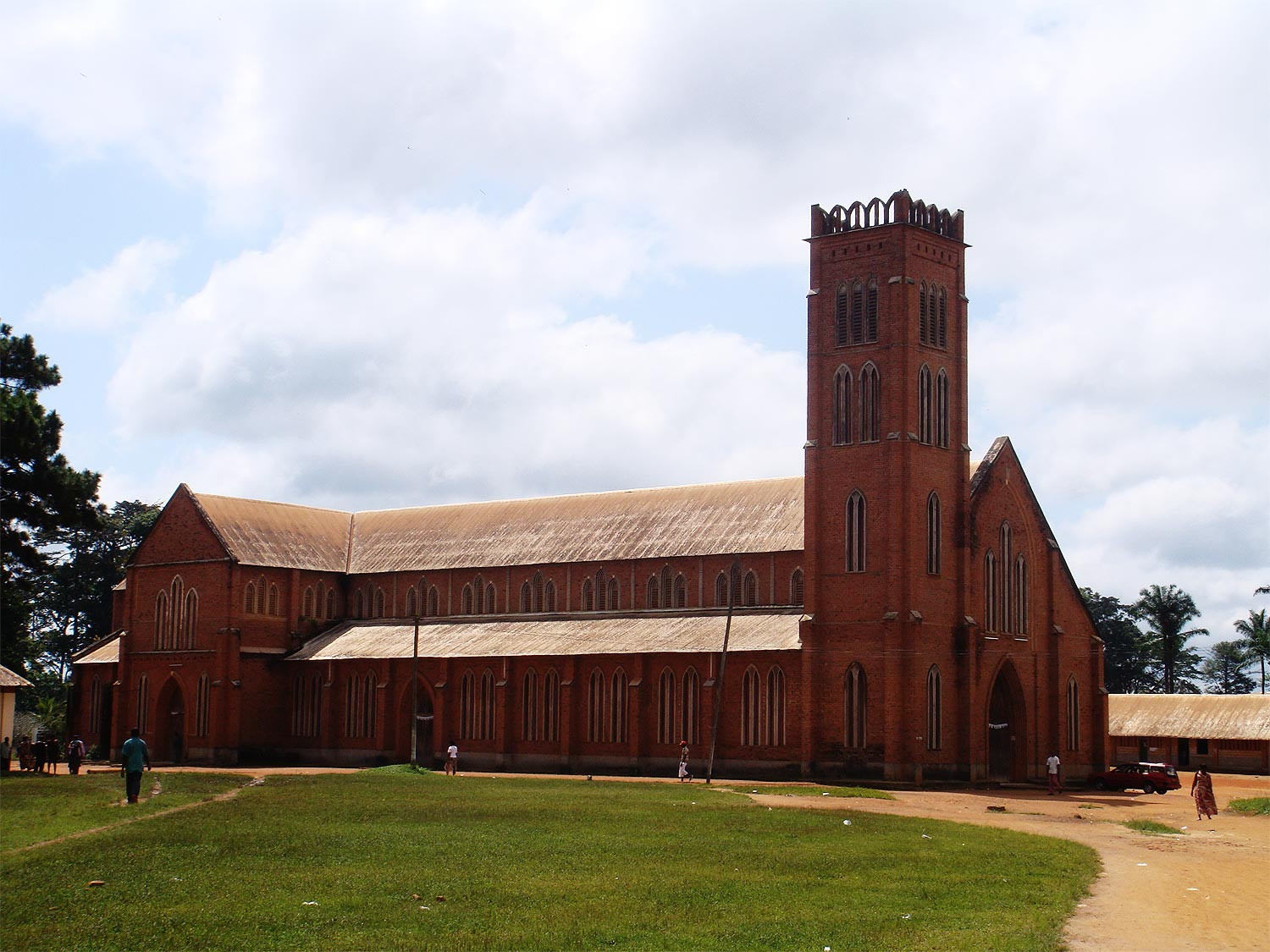 Кафедральный собор г. Мбальмайо, Камерун.